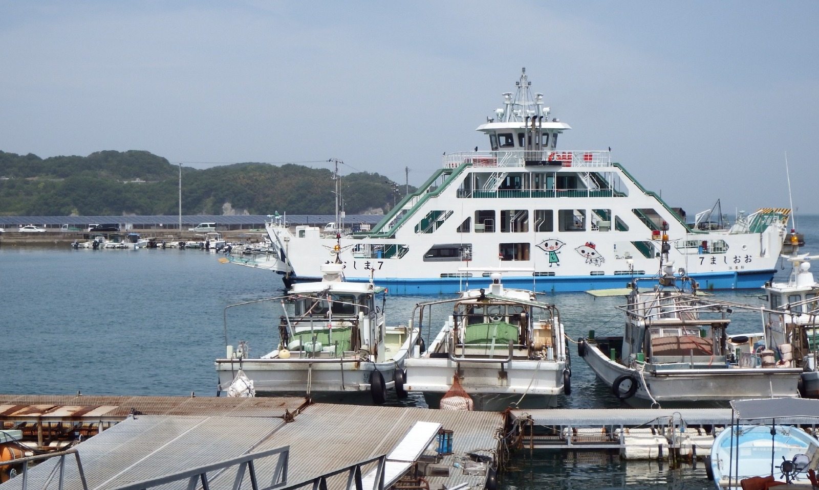 新居大島から来て黒島港に入港する定期便